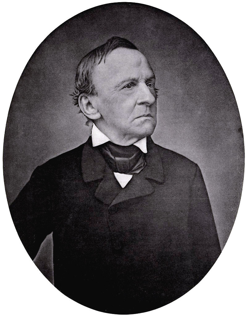 König Ludwig I. von Bayern, 1866.